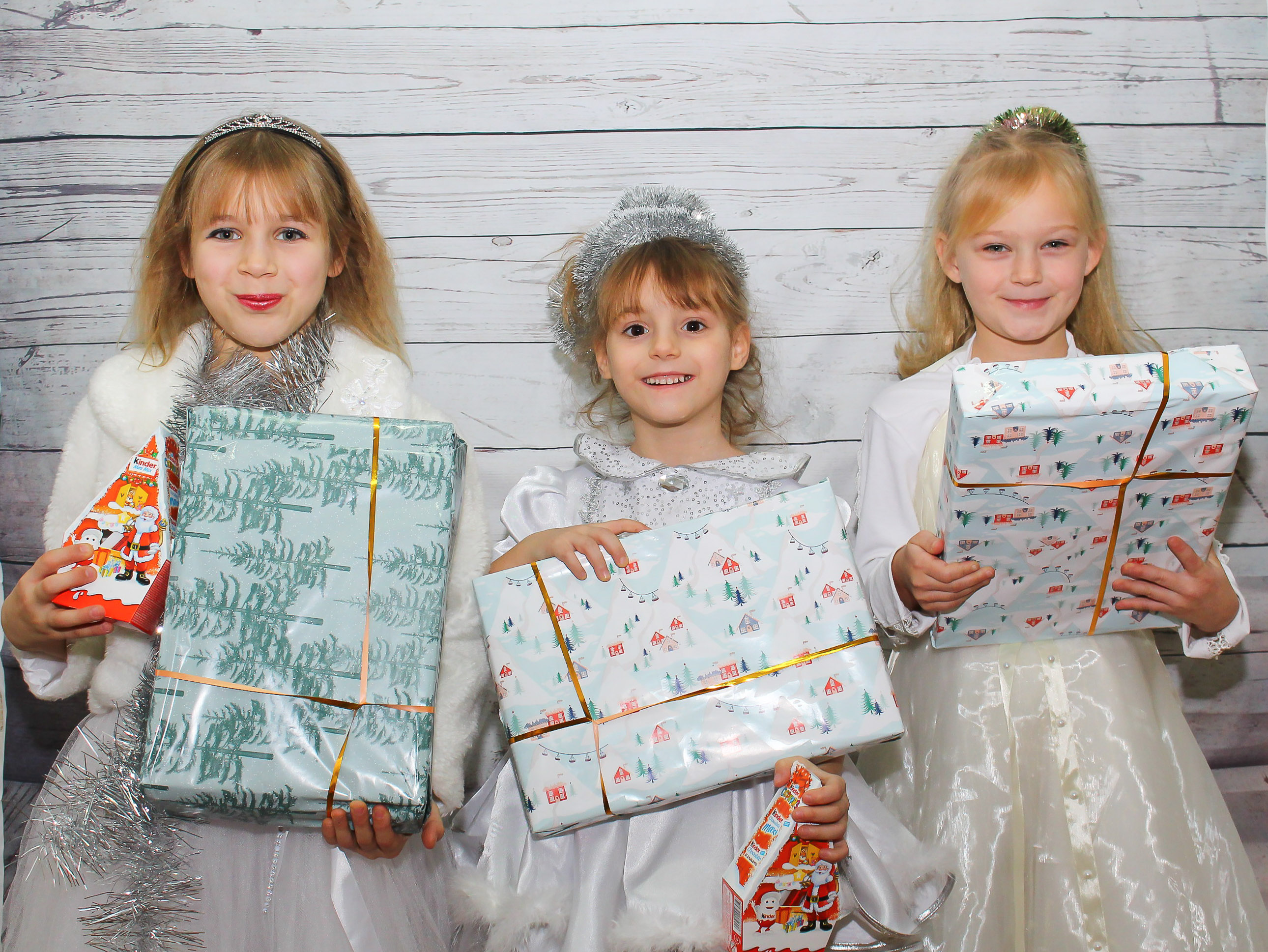 День Світого Миколая